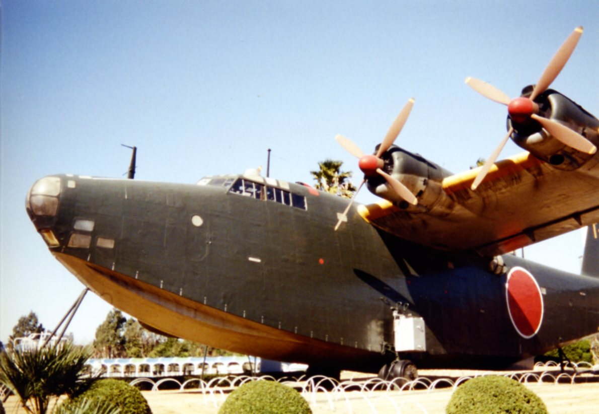 東京臨海副都心船之科學館戶外展示時的日本海軍二式大艇一二型426號機，現存海上自衛隊九州鹿屋航空基地資料館。（以立可拍相機拍攝，2009年2月11日據照片掃描。）